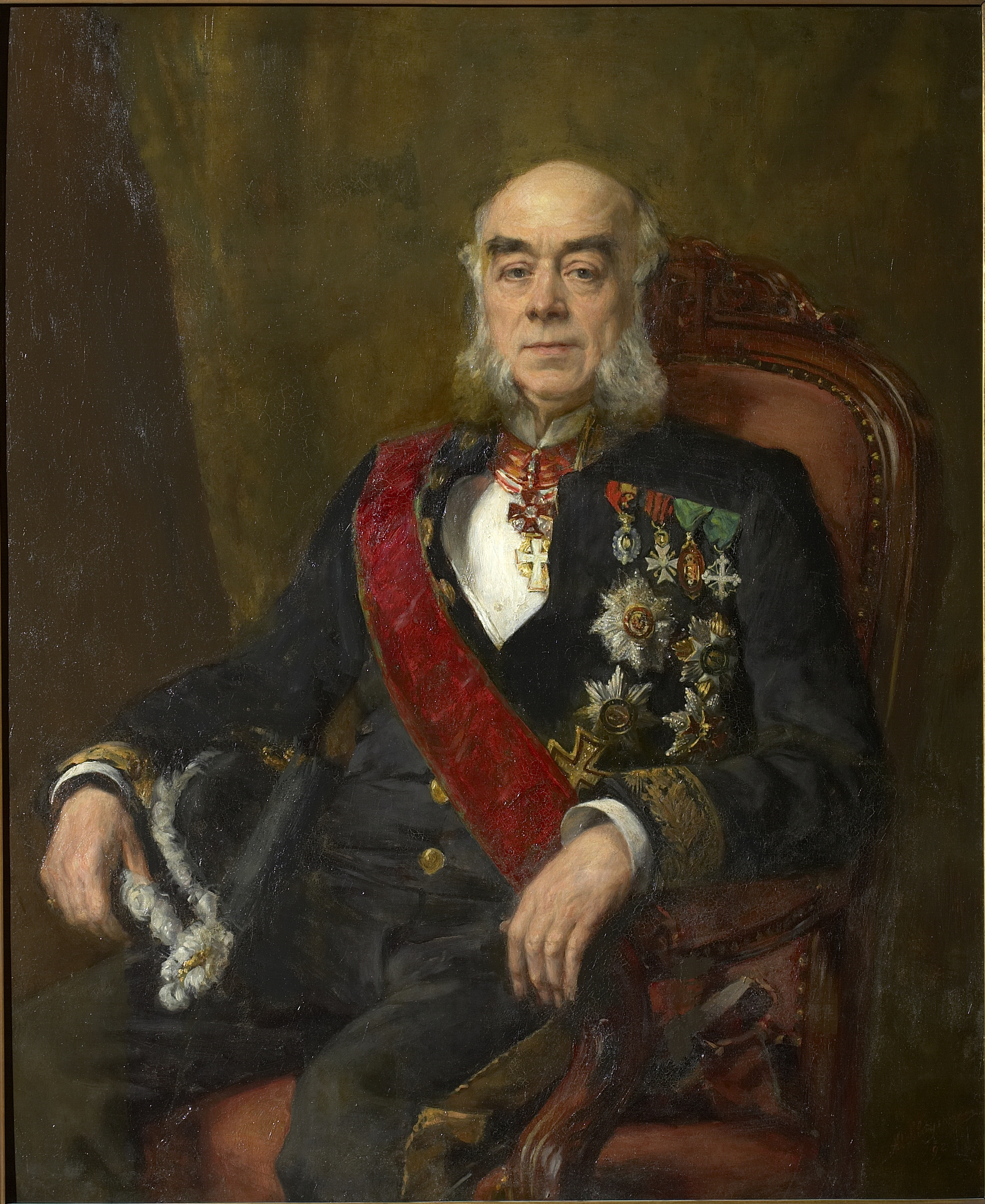 Henri 't Kint de Roodenbeke als voorzitter van de Senaat, door Alfred Cluysenaar